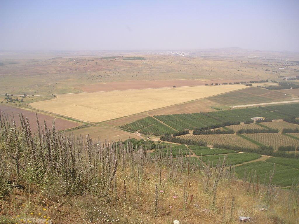 Вид с Голанских высот на территорию Сирии